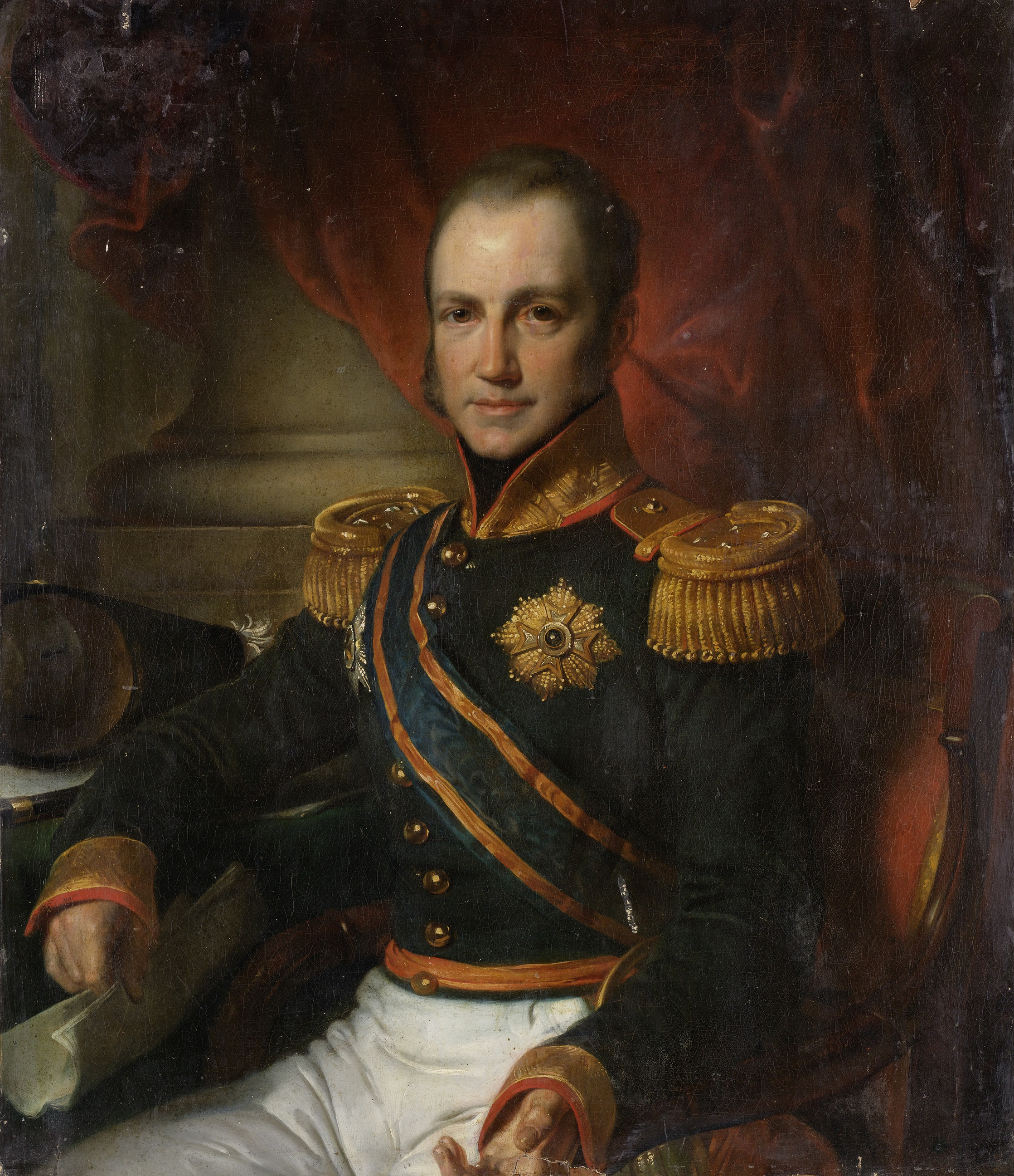 Portret van Godart Alexander Gerard Philip Baron van der Capellen (1778-1848). Gouverneur-generaal (1816-26). Ten halven lijve, zittend in een stoel. In de document in de rechterhand, gebarend met de linkerhand. Links een tafel waarop een commandostaf en een steek. Onderdeel van een reeks van portretten van de gouverneurs-generaal van het voormalige Nederlands Oost-Indië. Collection: schilderijen; Gouverneurs-generaal serie